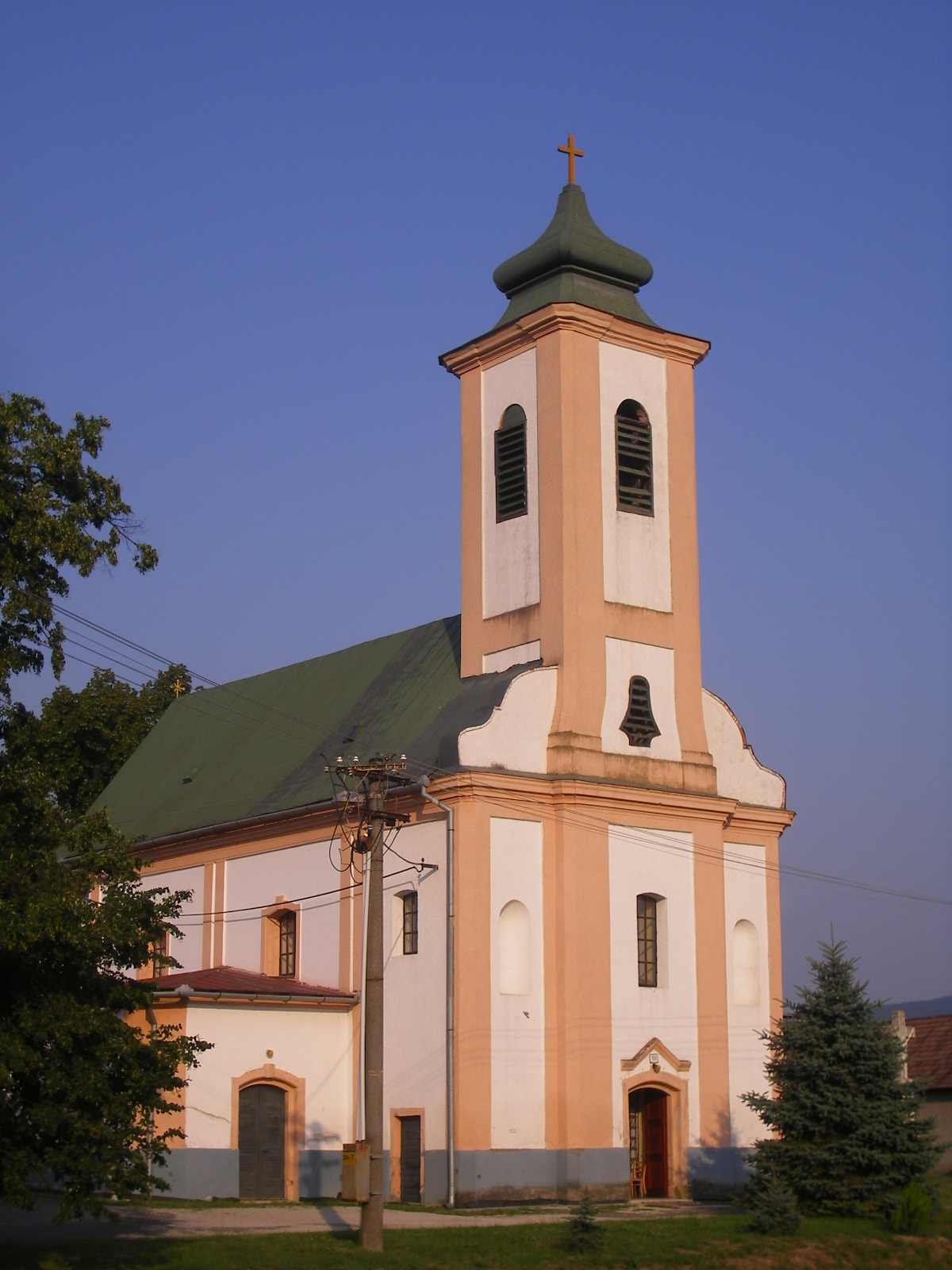 Ipolyszakállos - katolikus templom